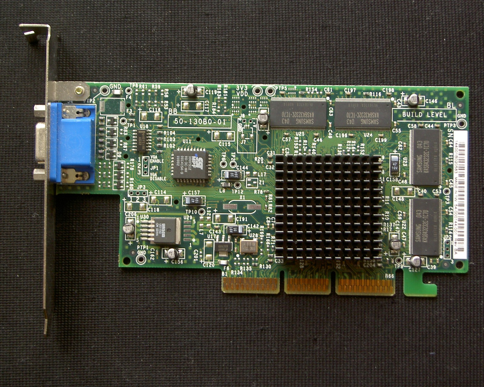 3DLabs Oxygen VX1 AGP4x